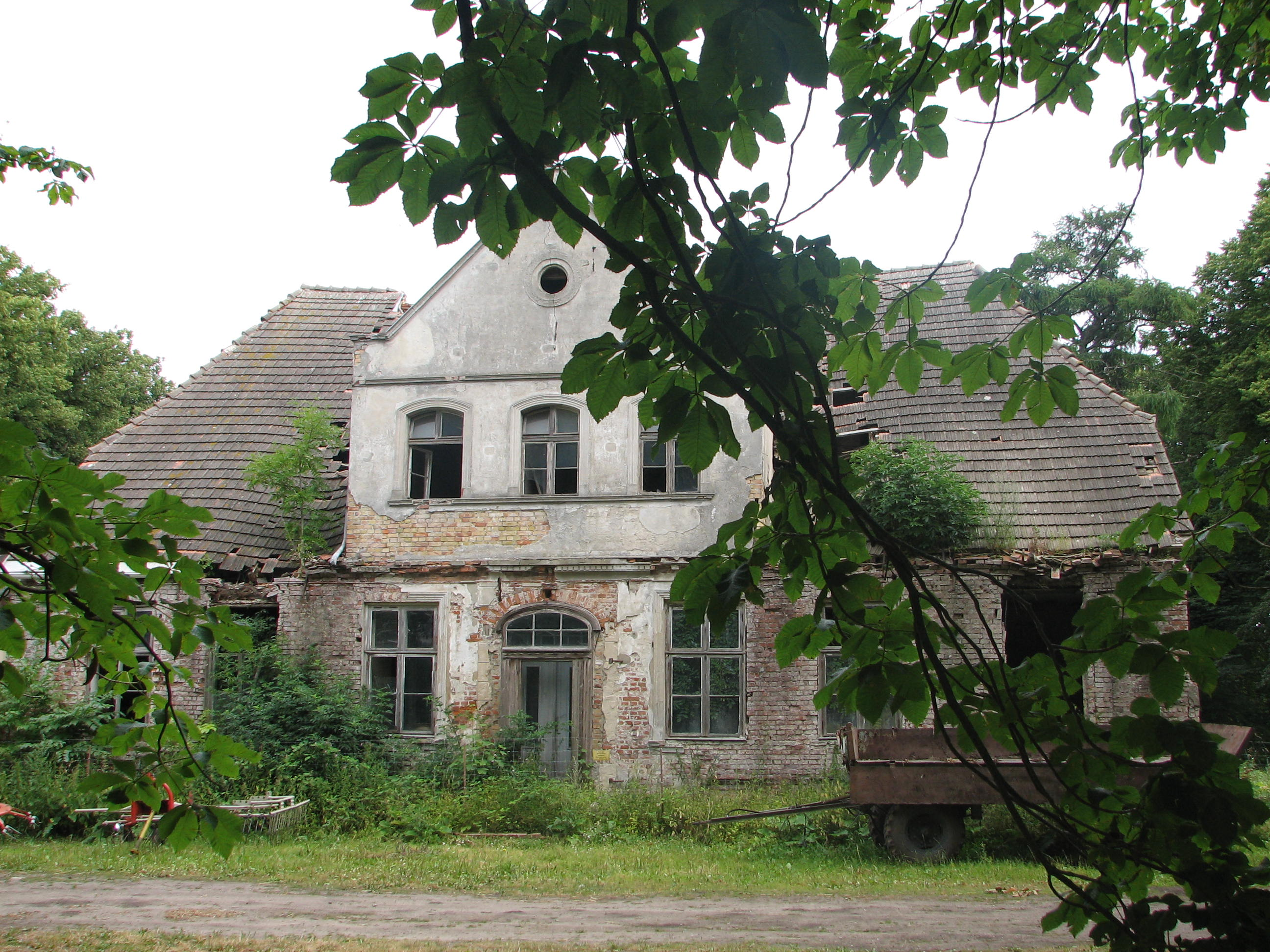 denkmalgeschütztes Gutshaus, zur Gutsanlage Parchow gehörend